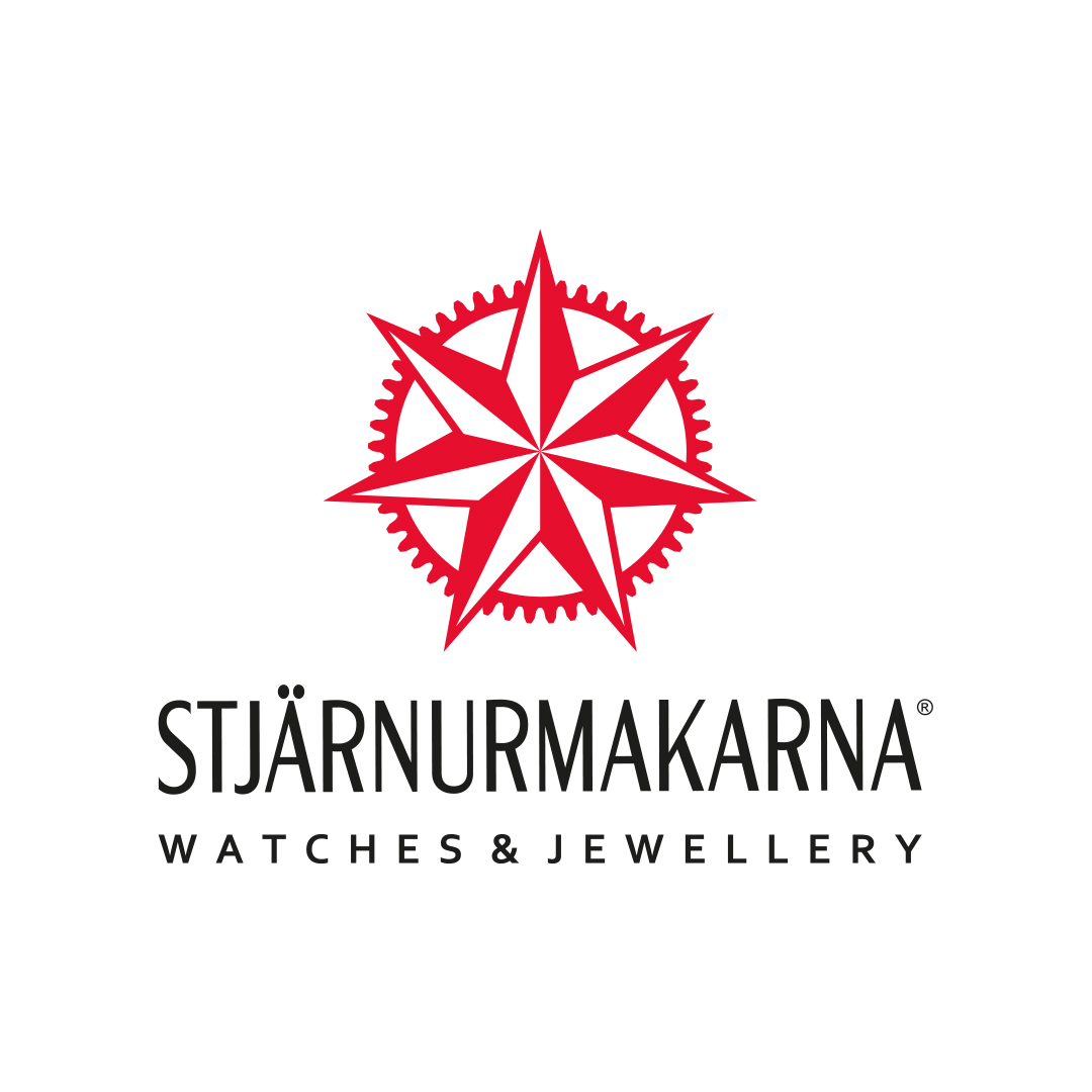 Stjärnurmakarna / logotyp